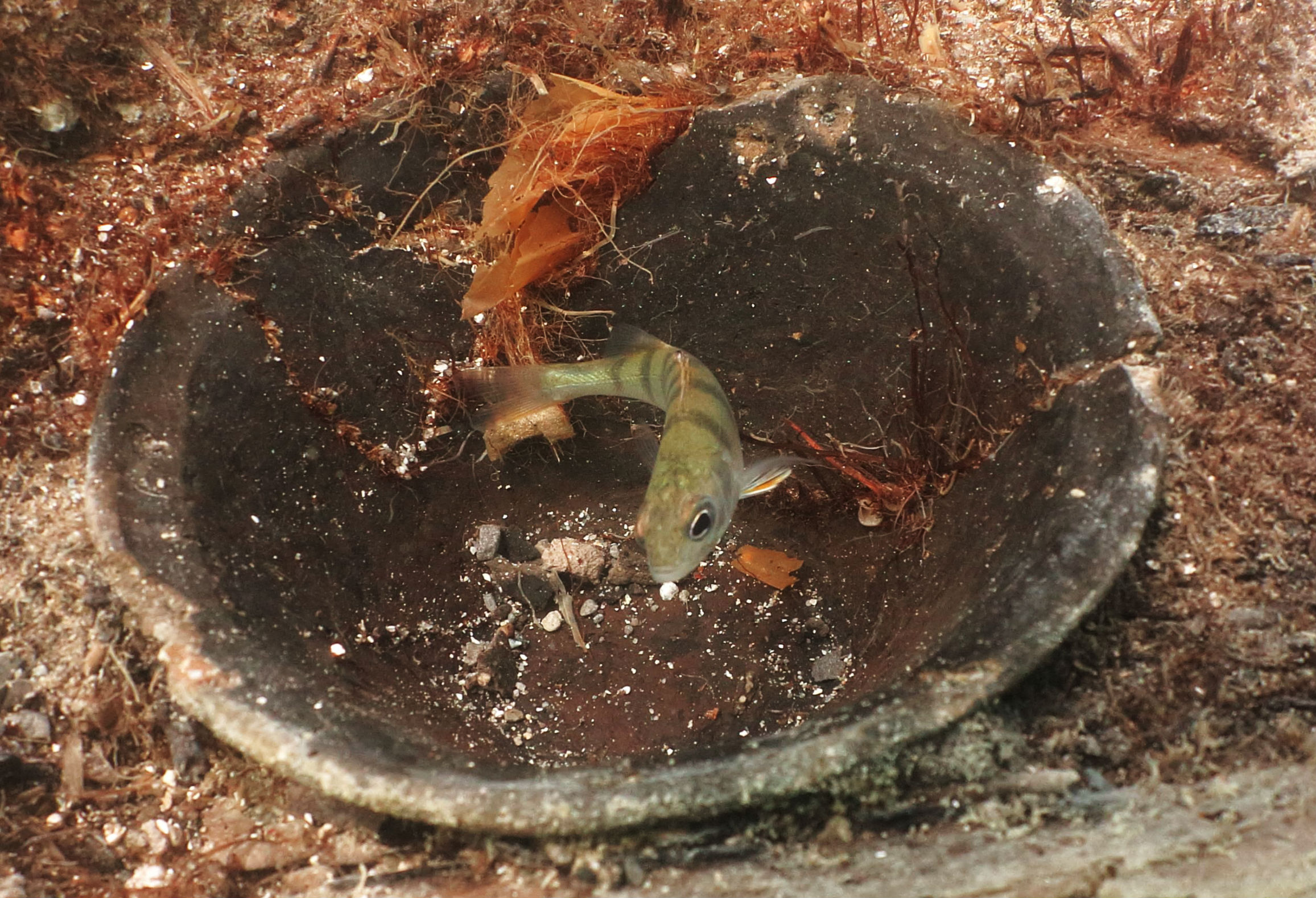 Bildarchiv der Kantonsarchäologie Aargau Objekt: Seeufersiedlung (Pfahlbauerdorf) Ort: Beinwil am See, Ägelmoos Aufnahmejahr: 2017 Beschreibung: Taucheinsatz der Stadtarchäologie Zürich (UWAD) Oberflächendokumentation des stark gefährdeten Haldenbereichs. In die offen liegende Kulturschicht eingebettete, vollständig erhaltene Schale der Spätbronzezeit Fisch: Egli (Flussbarsch)